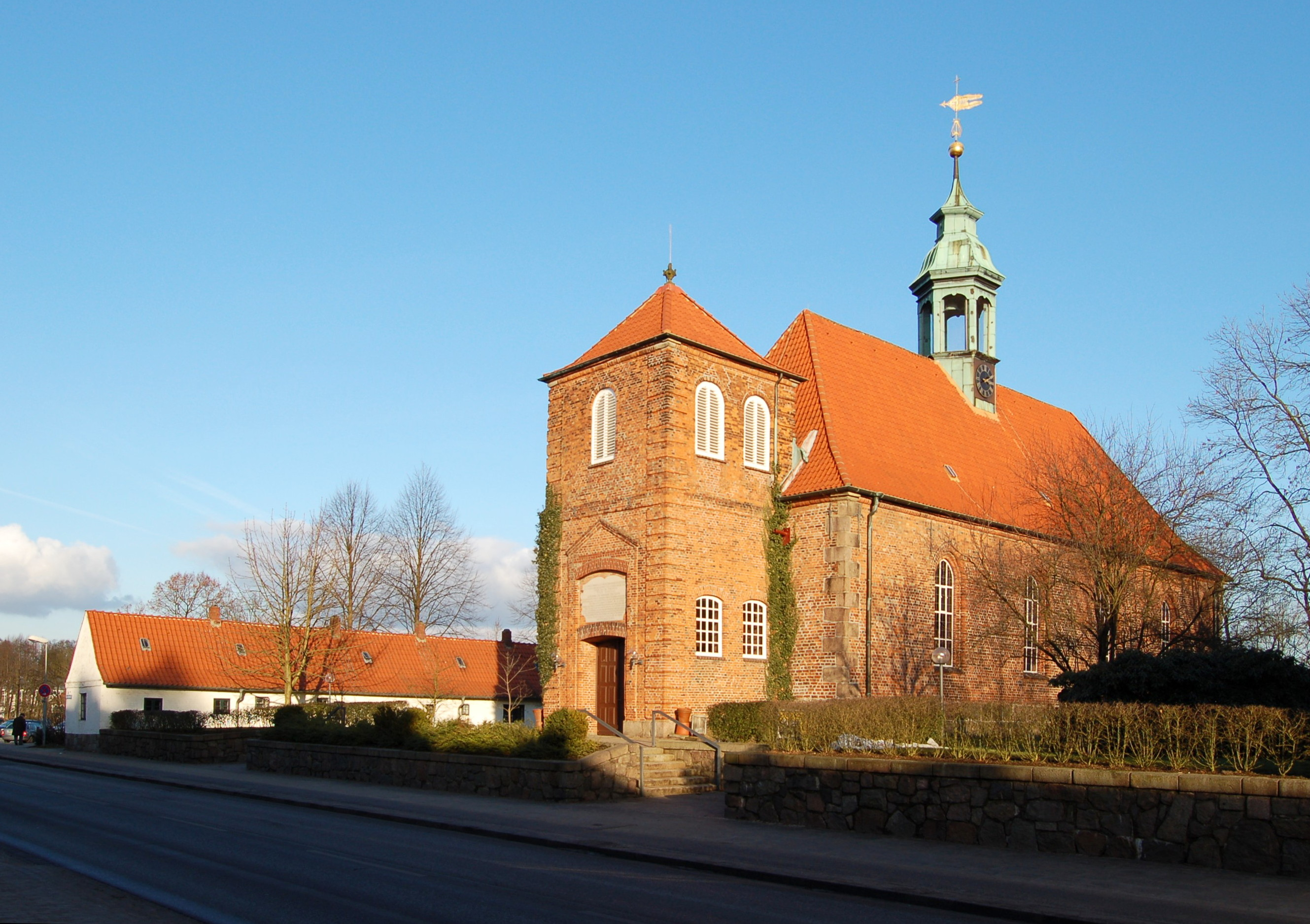 Schlosskirche Ahrensburg.